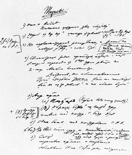 Первоначальный набросок Апрельских тезисов В. И. Ленина. 3(16) апр. 1917.